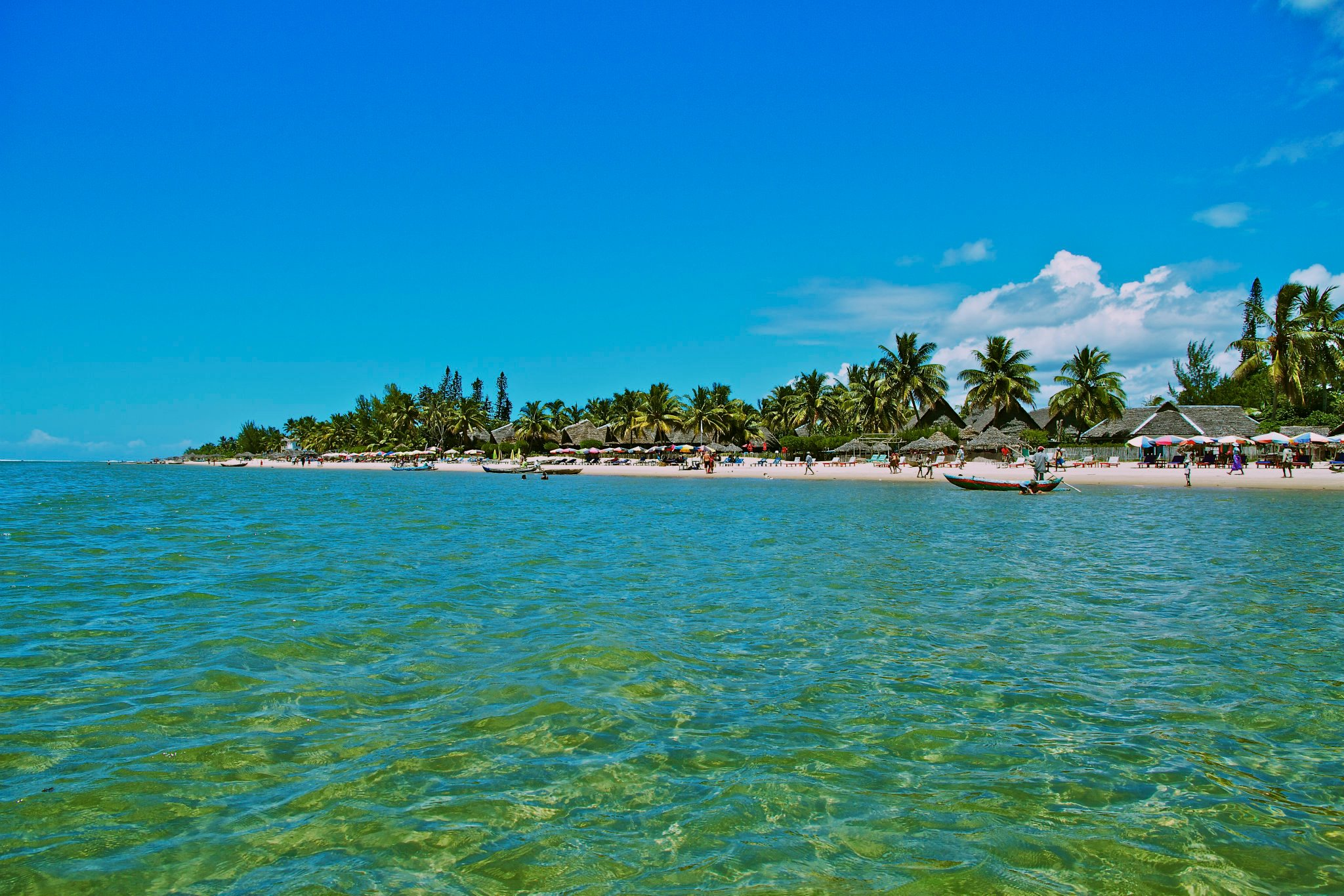 Vue sur la Plage de Foulpointe